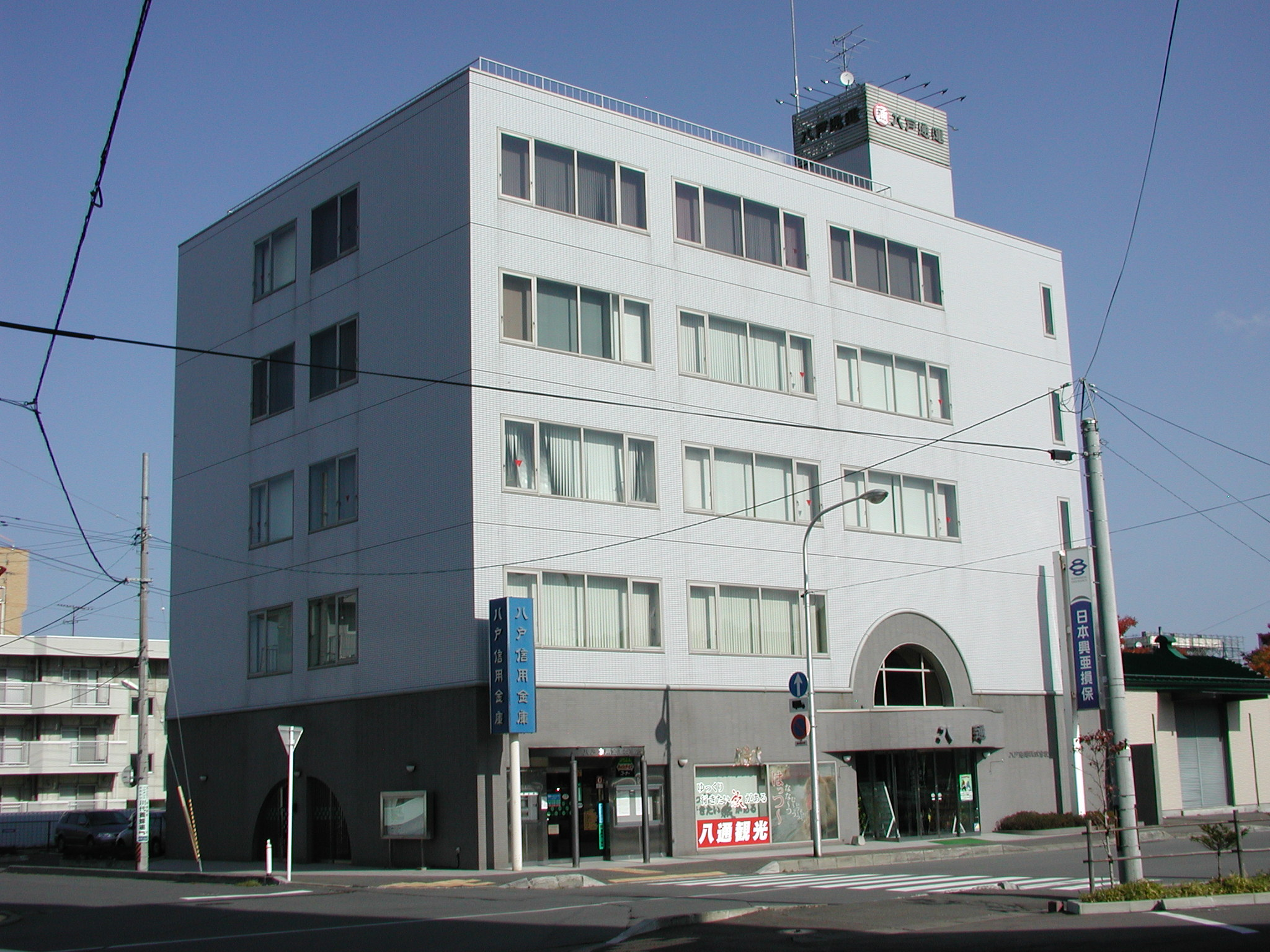 八戸通運 本社（同ビルには他に、日本興亜損害保険・八戸信用金庫などが入居。）